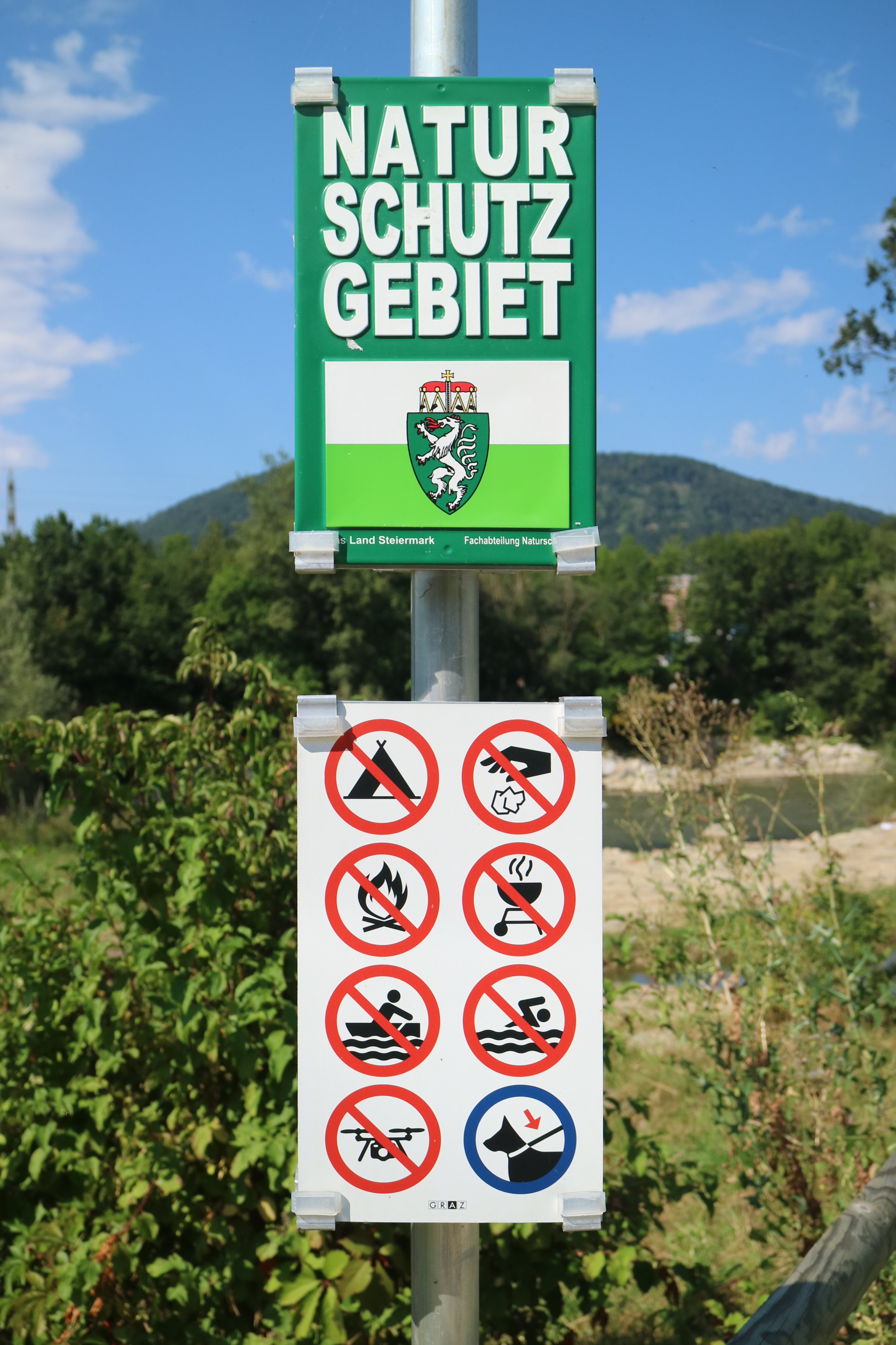 Vogelschutzgebiet Weinzödl im Grazer Stadtbezirk Andritz